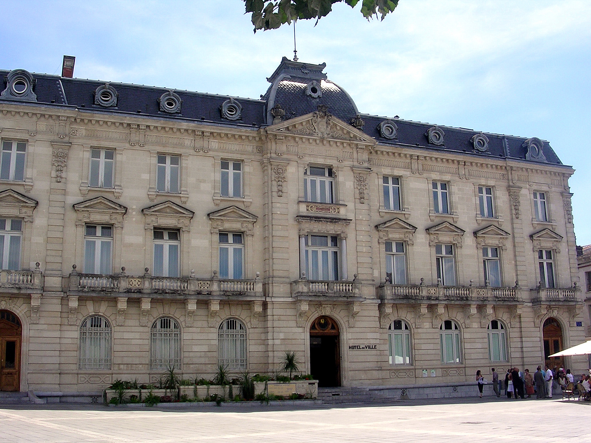 Façade de l'hôtel de ville de Mont-de-Marsan (Landes, France). Photo prise en juillet 2006.